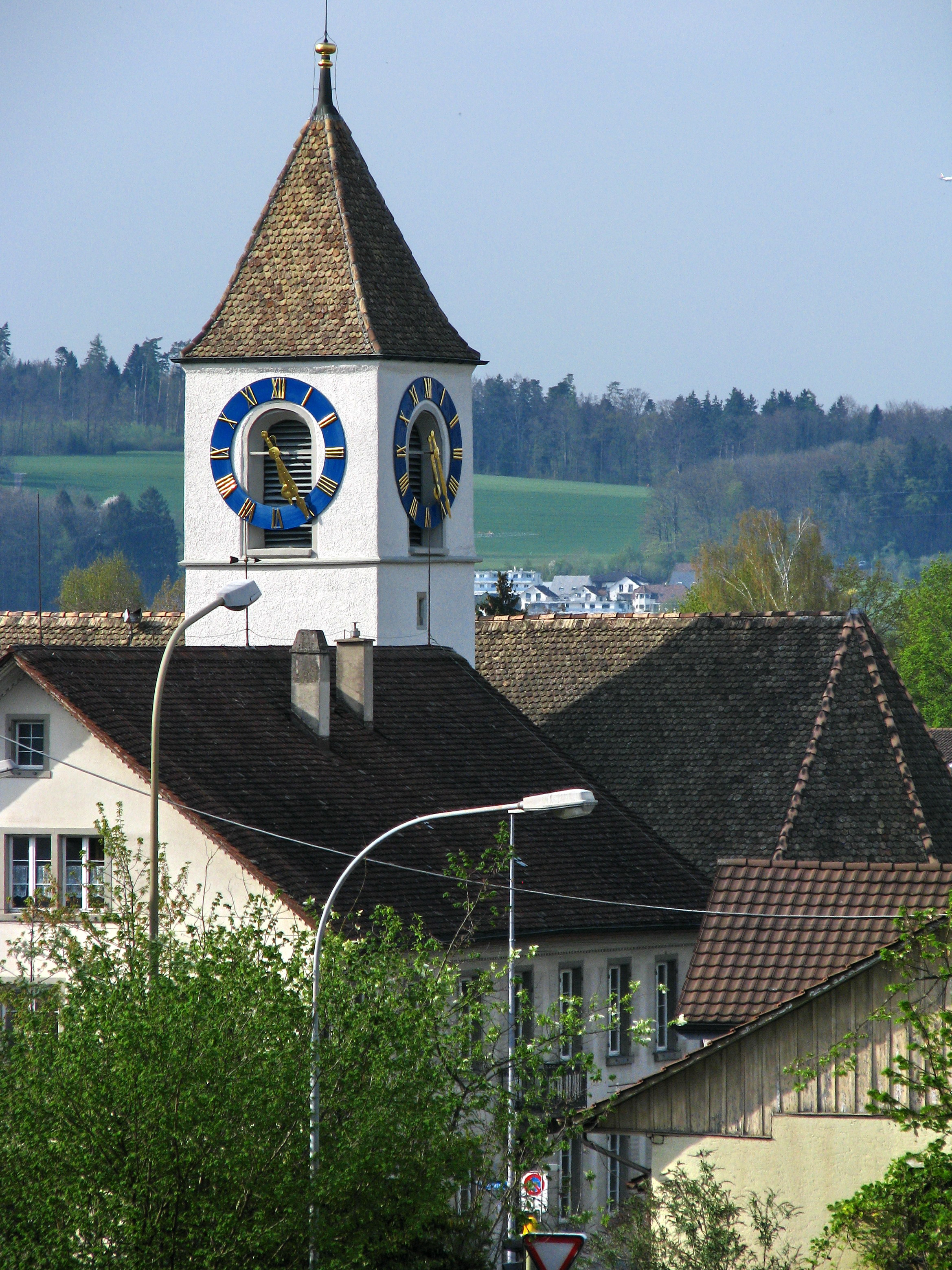 Regensdorf (Switzerland)